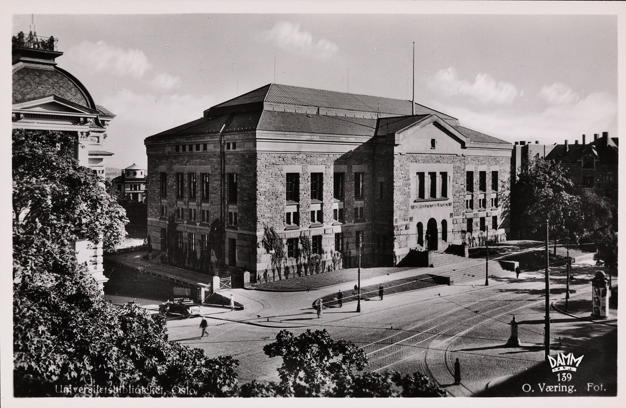 Tittel / Title: Universitetsbiblioteket, Oslo (i dag Nasjonalbiblioteket) Beskrivelse / Description: Postkort. I dag er dette Nasjonalbiblioteket. Dato / Date: 1930-årene Fotograf / Photographer: O. Væring Utgiver / Publisher: Damm Sted / Place: Oslo, Solli plass, Nasjonalbiblioteket Eier / Owner Institution: Nasjonalbiblioteket / National Library of Norway Lenke / Link: Bildesignatur / Image Number: blds_02344